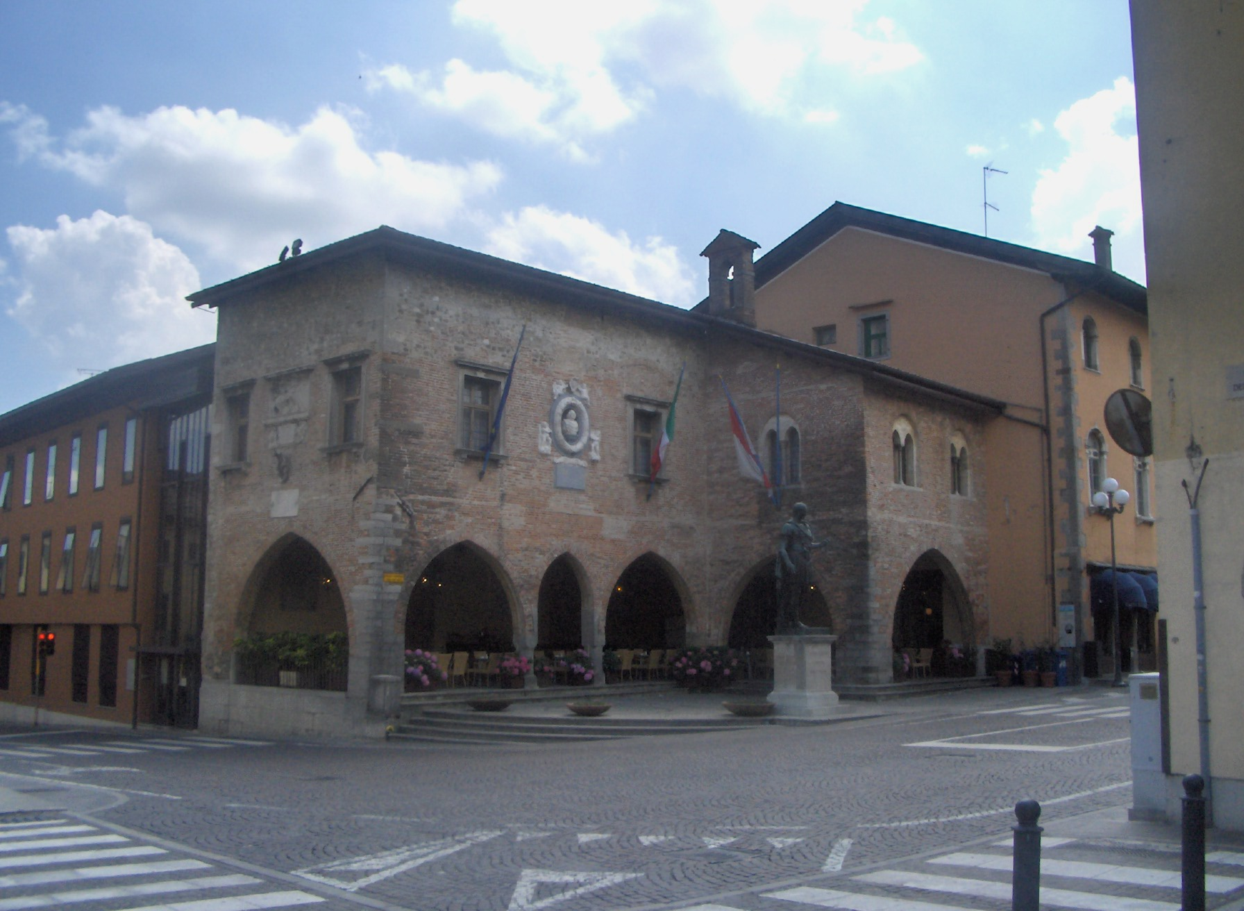 Cividale del Friuli, Palazzo comunale. Foto di Sebi1.